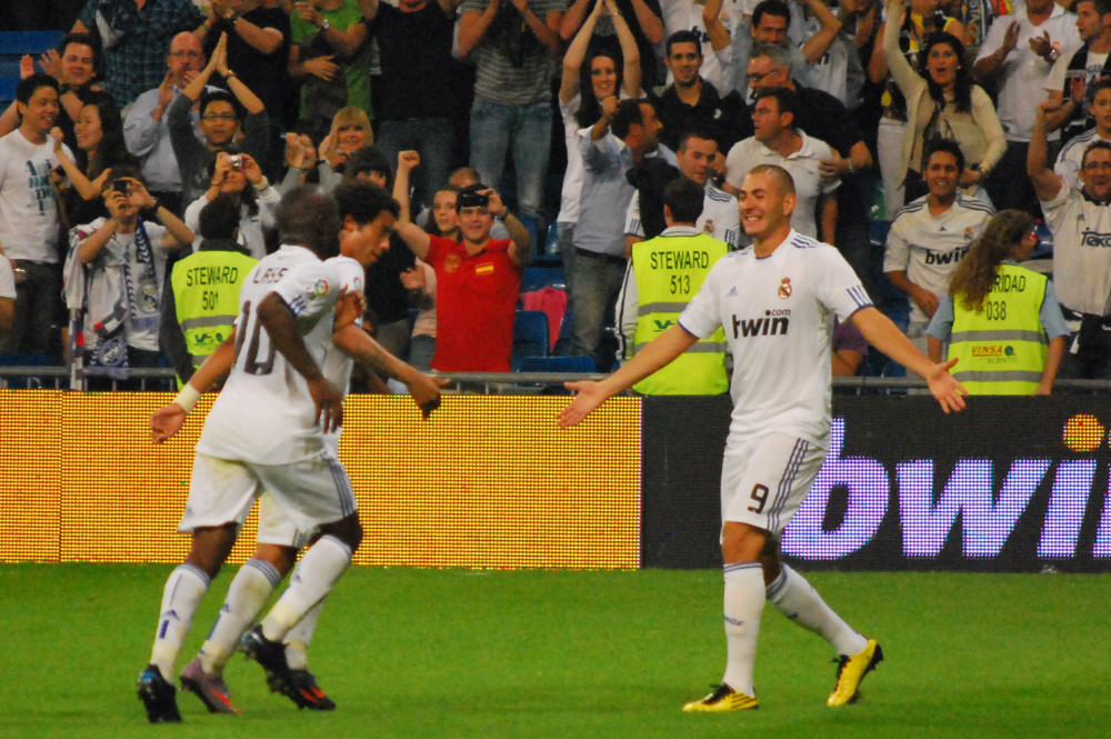 Benzema celebrate scored goal vs RDC Espnyol